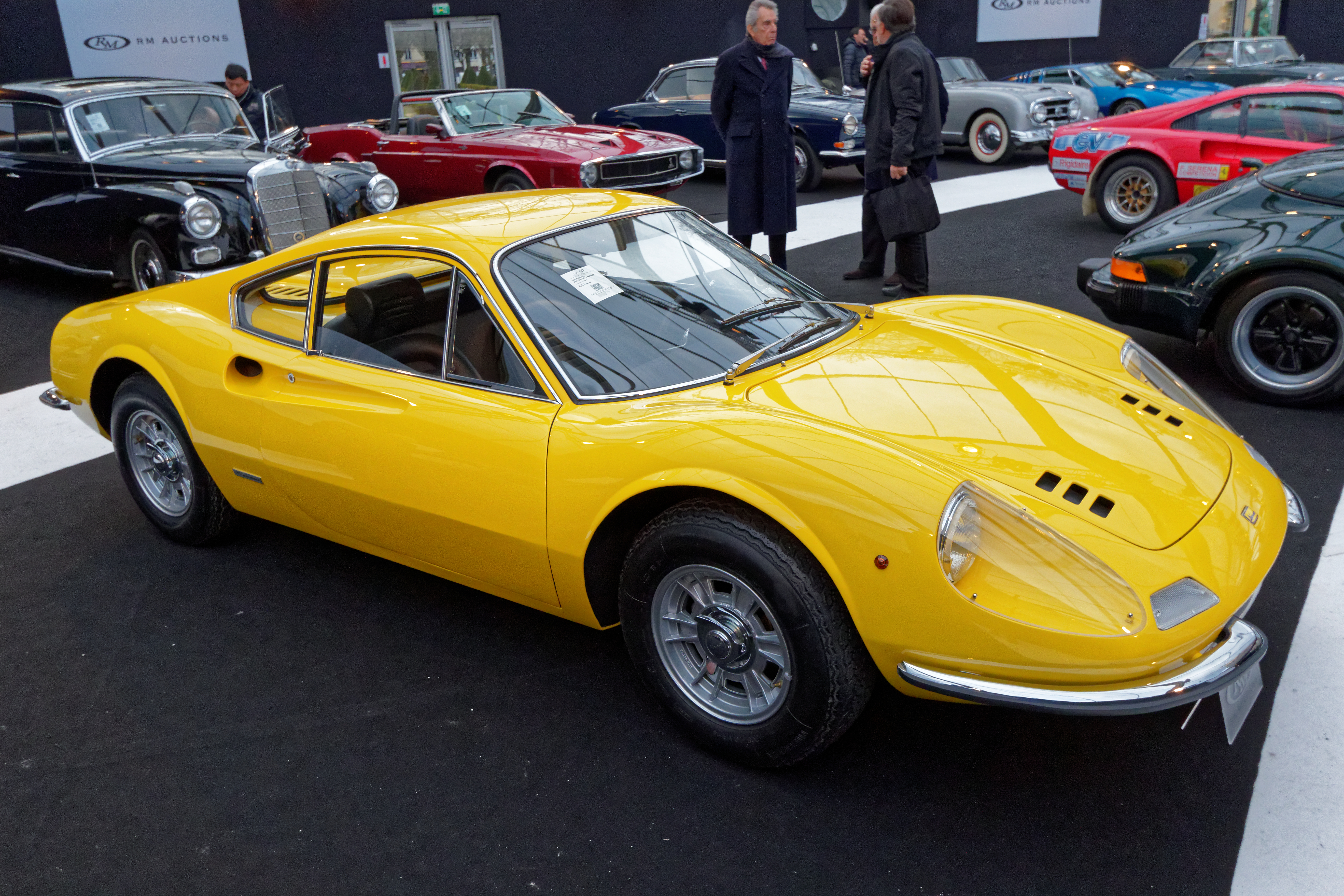 La vente aux enchères RM auctions aux pied des Invalides à Paris le 4 février 2015.